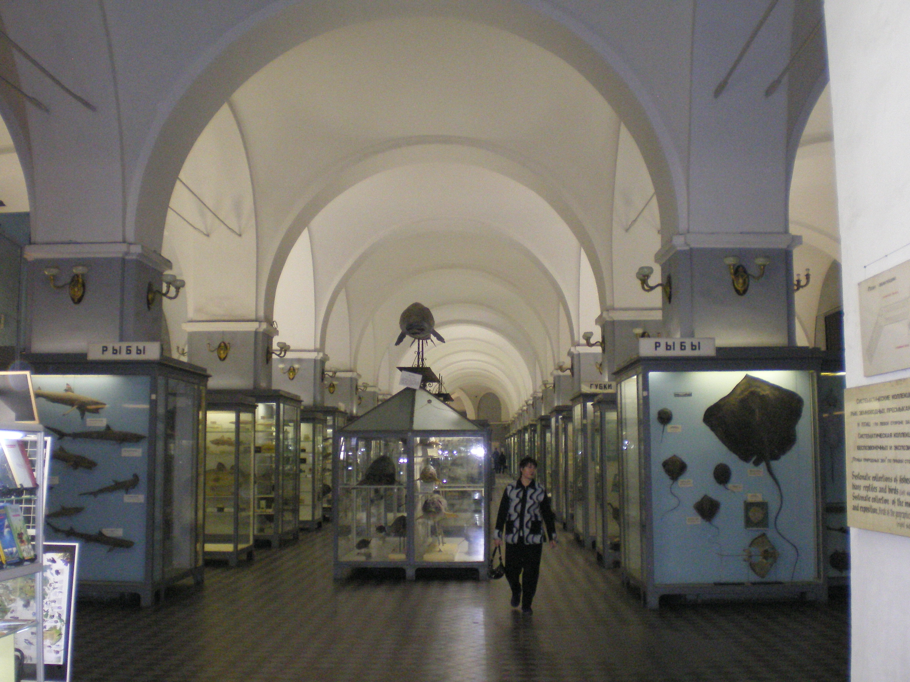 Зоологический музей. Один из залов